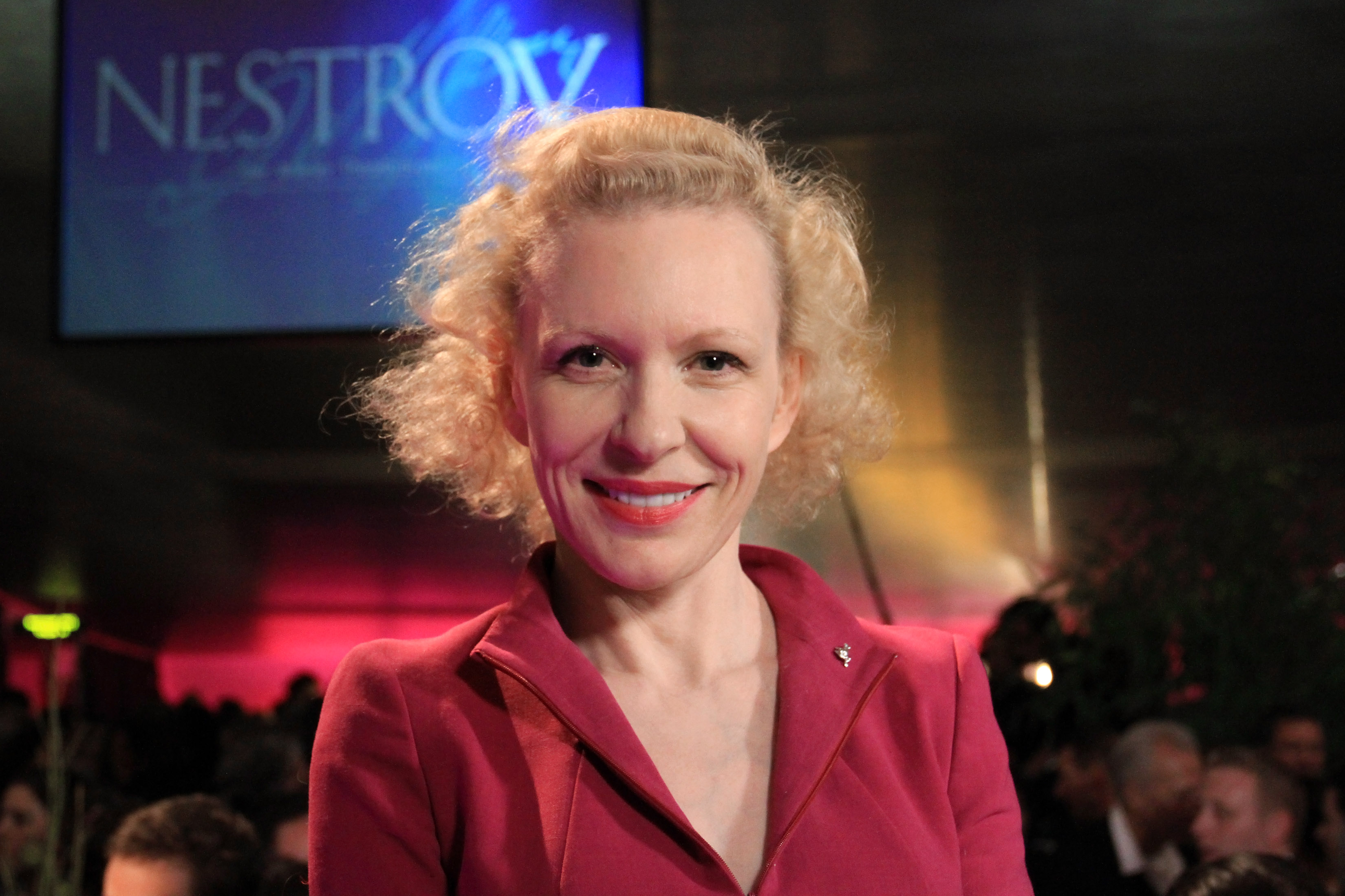 Sunnyi Melles beim Nestroy-Theaterpreis 2012 im MuseumsQuartier in Wien.